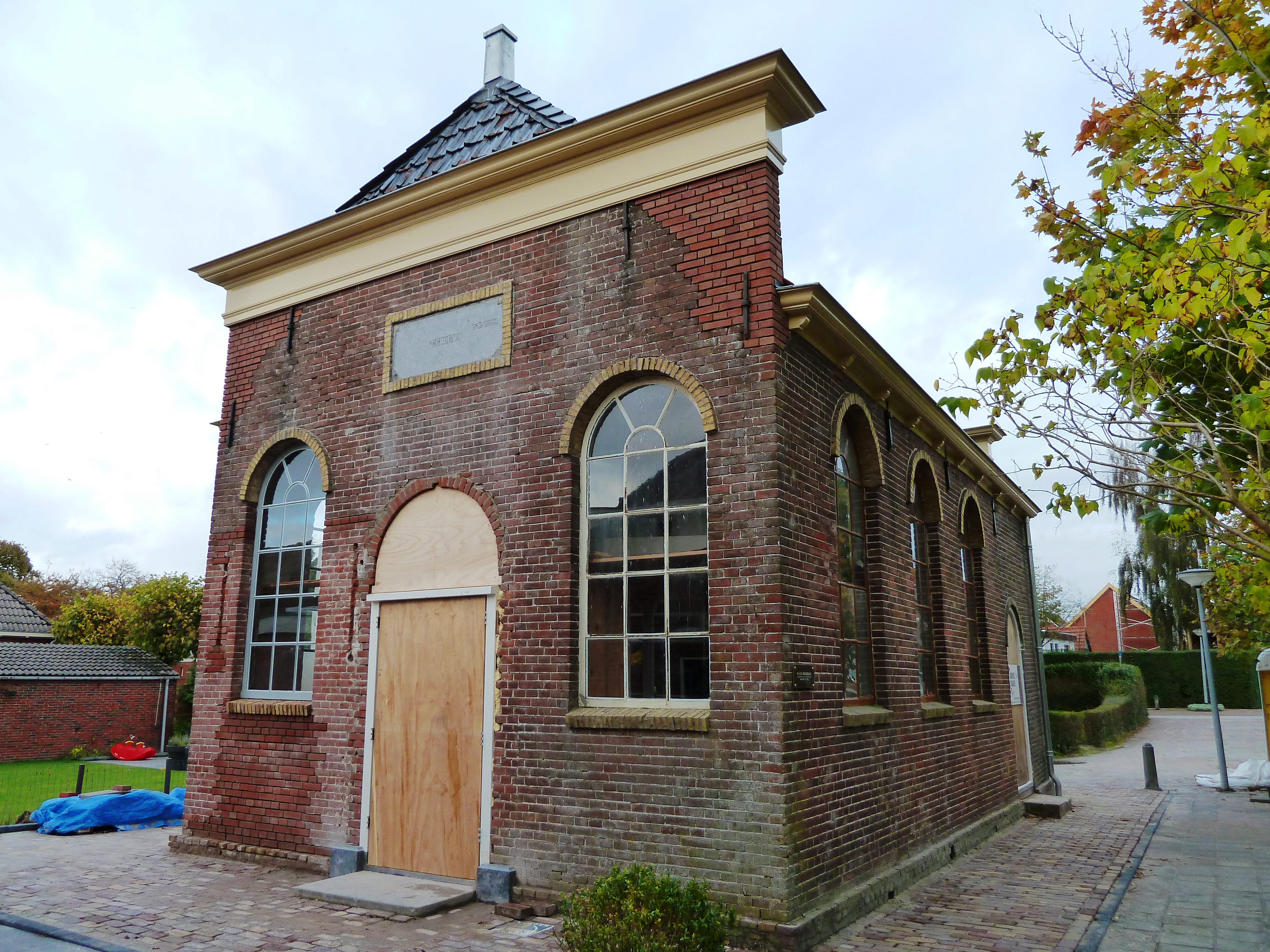 Synagoge in Winsum tijdens de restauratie in 2010. Gebouwd in 1878. Verkocht in 1934. Gerestaureerd in 2010.